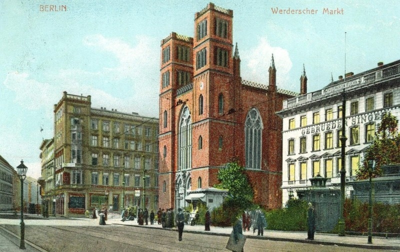 Werderscher Markt, Blick auf die nördliche Seite